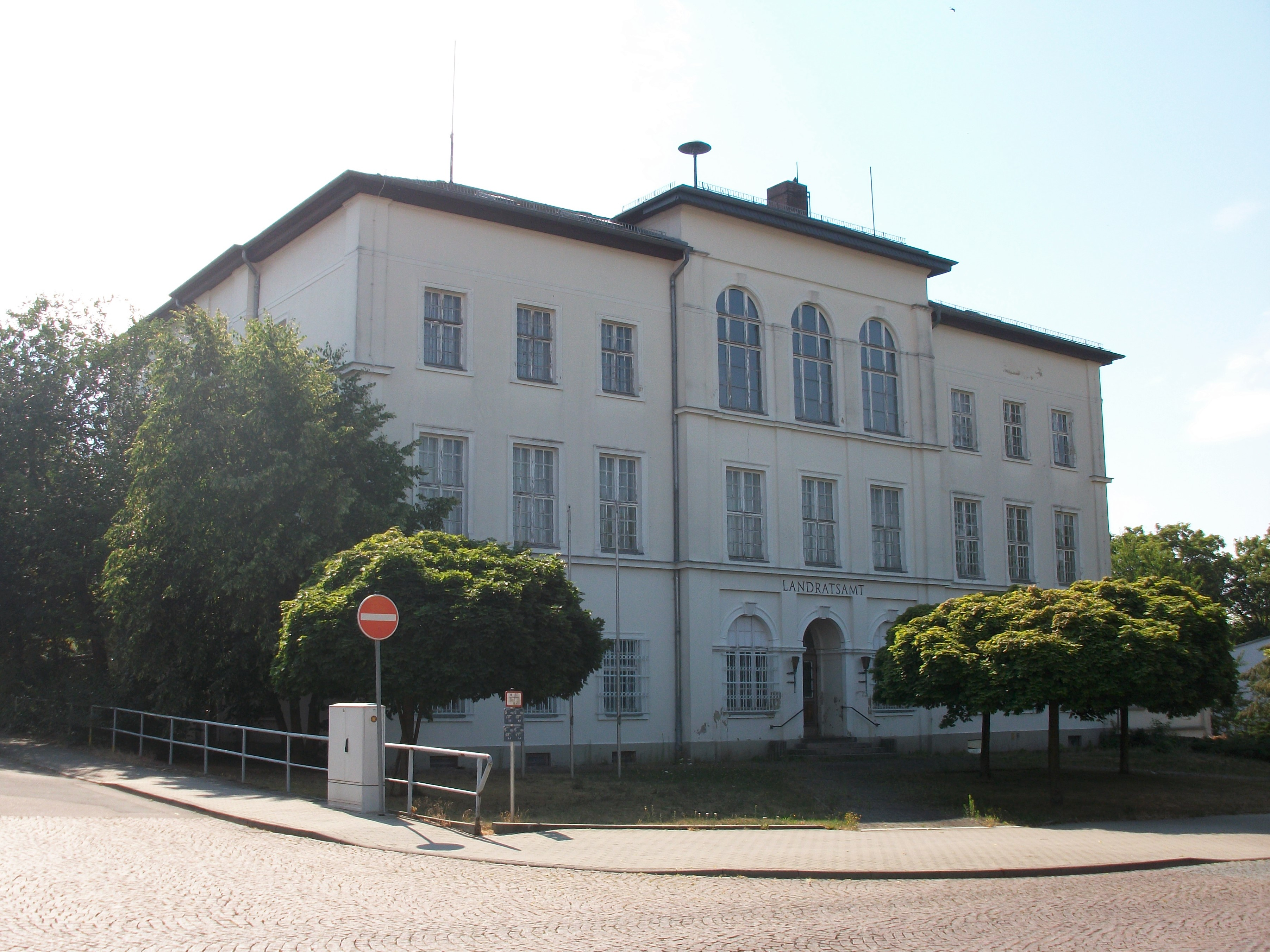 Landratsamt Geithain (2018)